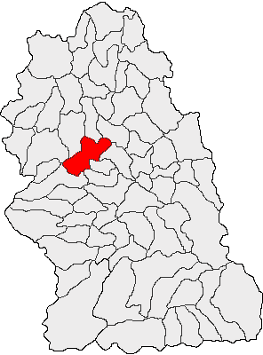 Categorie:Hărţi ale judeţului Hunedoara